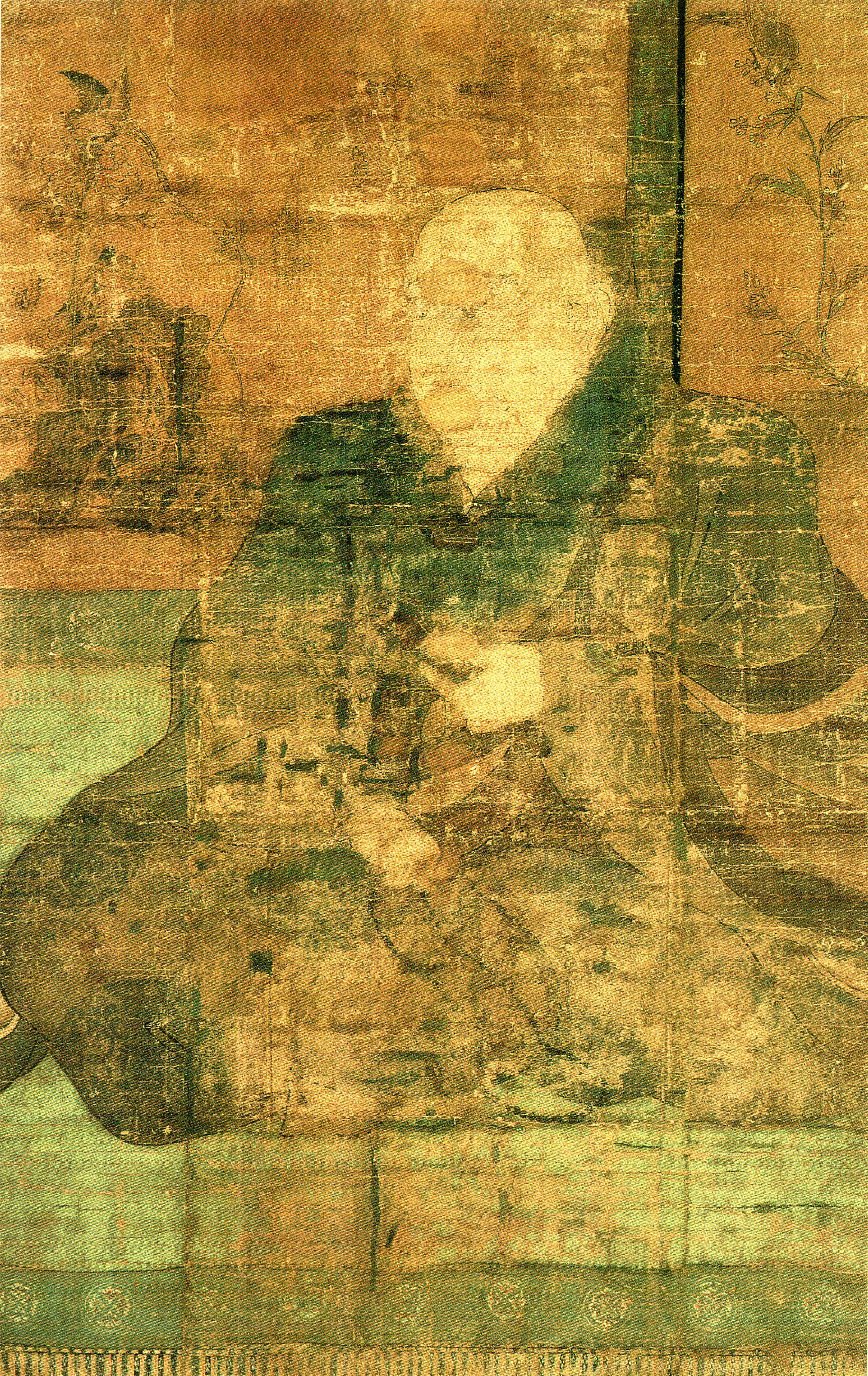 妙法院所蔵の後白河法皇肖像。数ある後白河法皇肖像の中で最も古いもの。